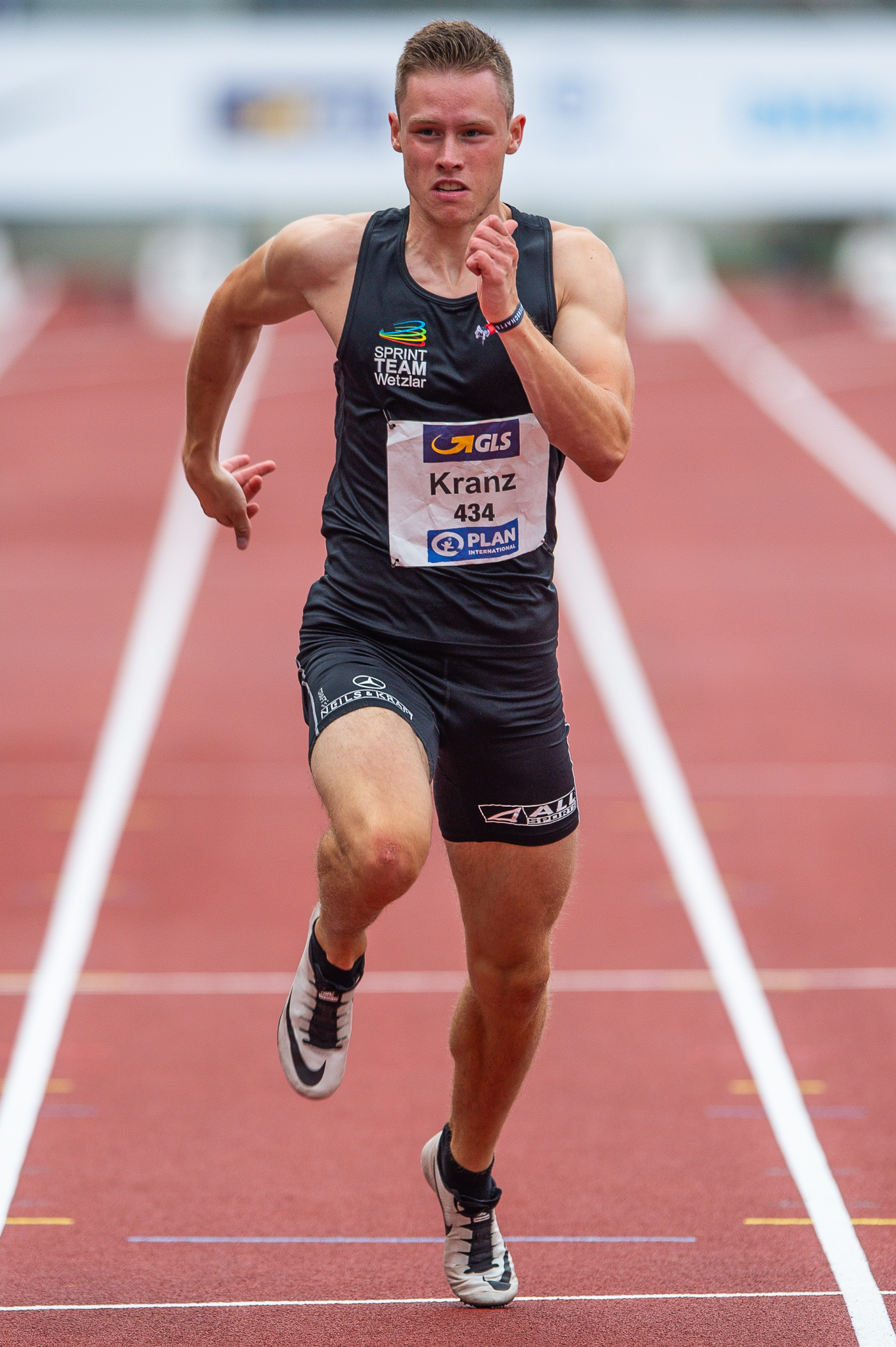 100-Meter-Lauf,100-metres race,DLV,Deutsche Leichtathletik Meisterschaften 2018,Deutscher Leichtathletik-Verband,Kevin Kranz,Max-Morlock-Stadion,Sprintteam Wetzlar